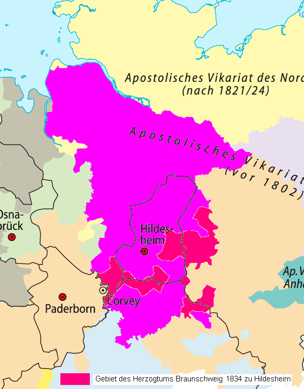 Karte der Diözese Hildesheim vor 1802 und nach 1824 (Impensa Romanorum pontificum)